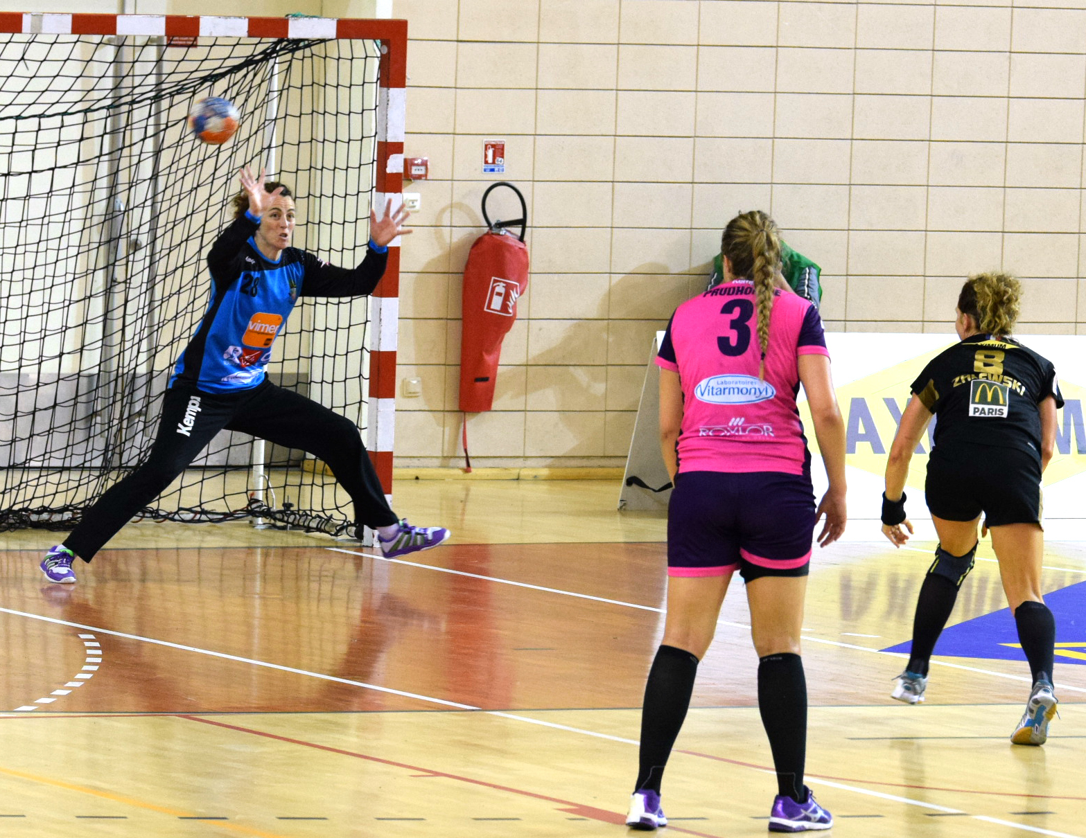 Marion Callavé Le 06 novembre 2015, lors du match Issy Paris Hand / Nantes LAHB comptant pour la 11e journée de LFH. Au stade Robert Carpentier à Issy-les-moulineaux.